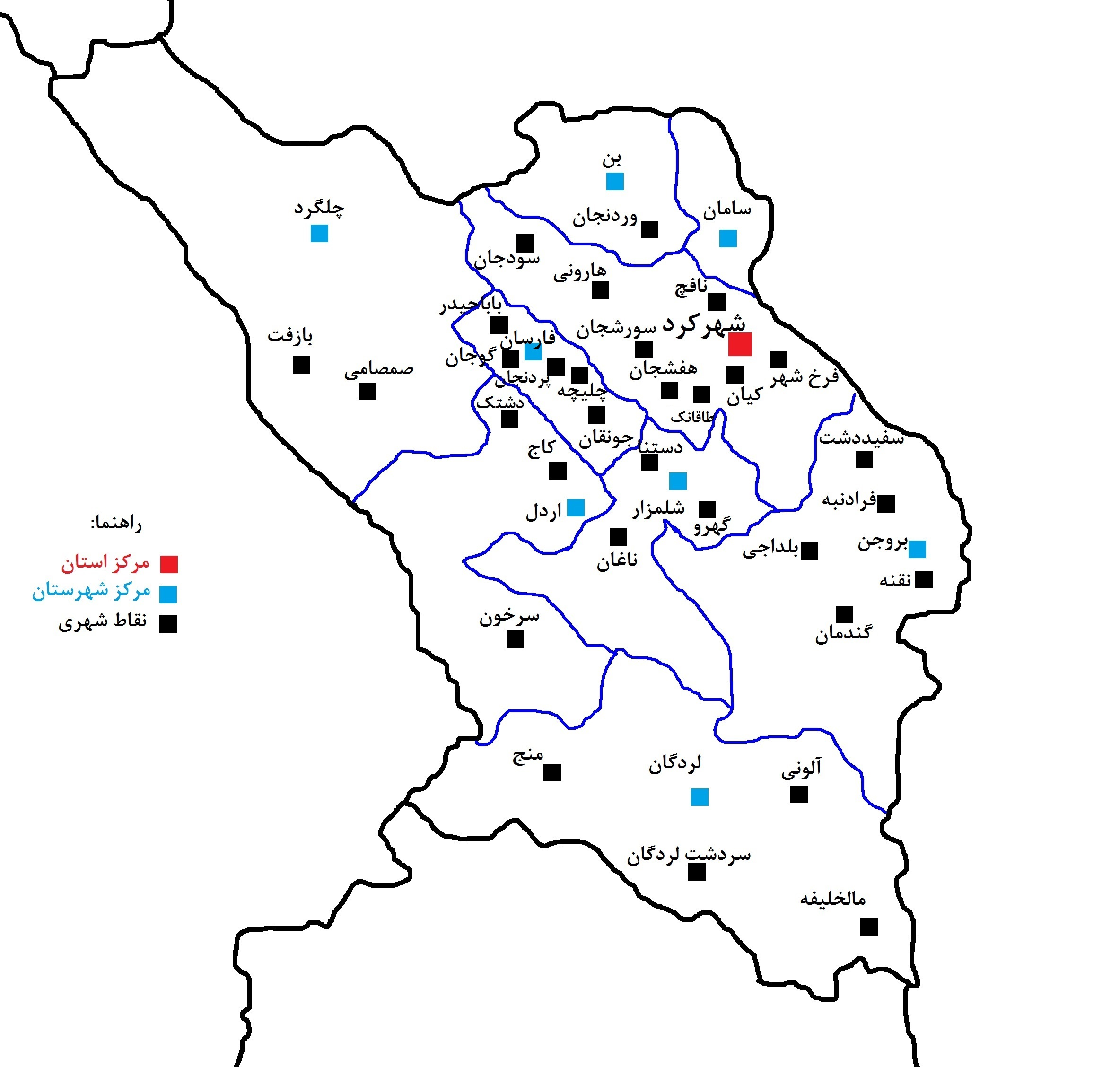 پراکندگی شهرهای استان چهارمحال و بختیاری در شهرستانهای نه گانه